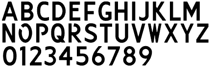 Font tipogràfica matrícules dels Països Baixos.